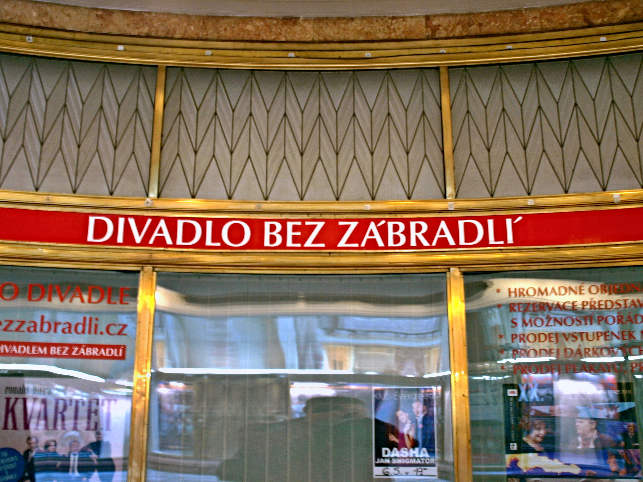 Pasáž paláce Adria v Praze